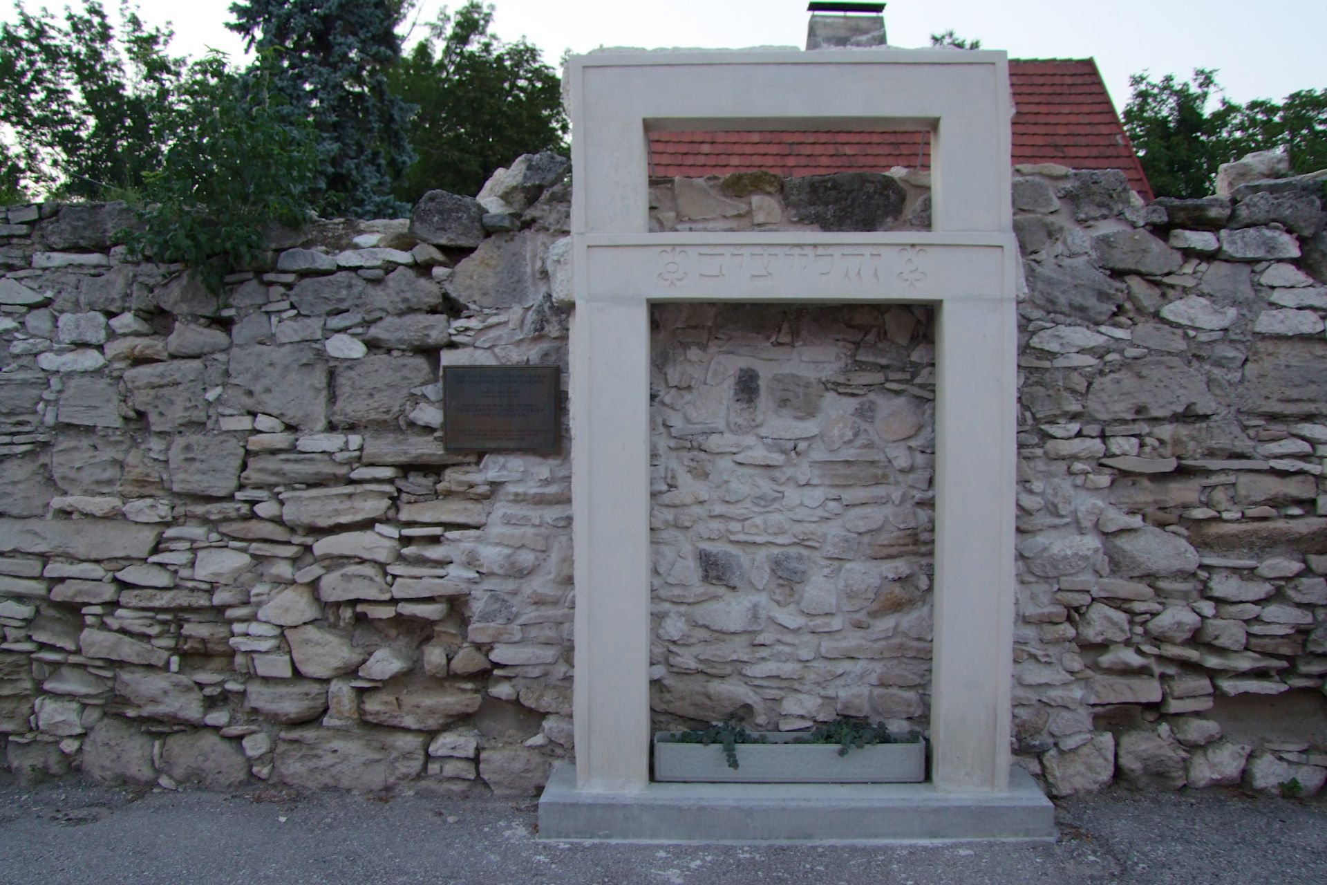 Stadtmauer (Parzellenmauer zur Straße), Annagasse 15: Toreinfassung der ehemaligen Synagoge